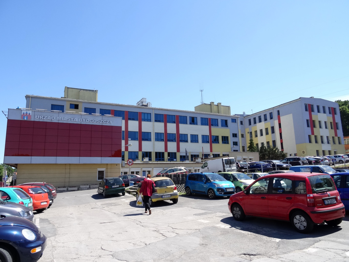 Urząd Miasta Bydgoszczy, ul. Grudziądzka 9-15